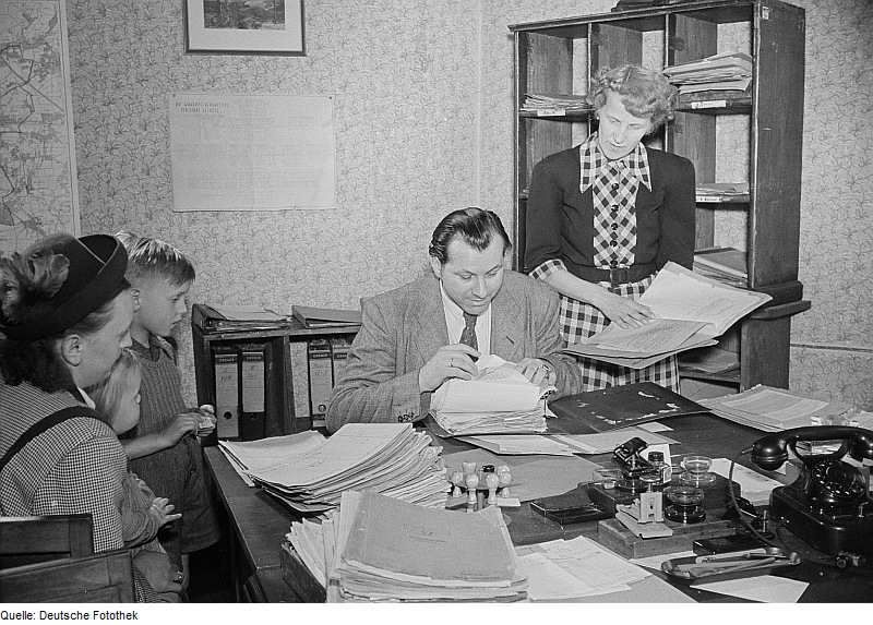 Original image description from the Deutsche Fotothek Mutter mit Kind auf dem Wohnungsamt